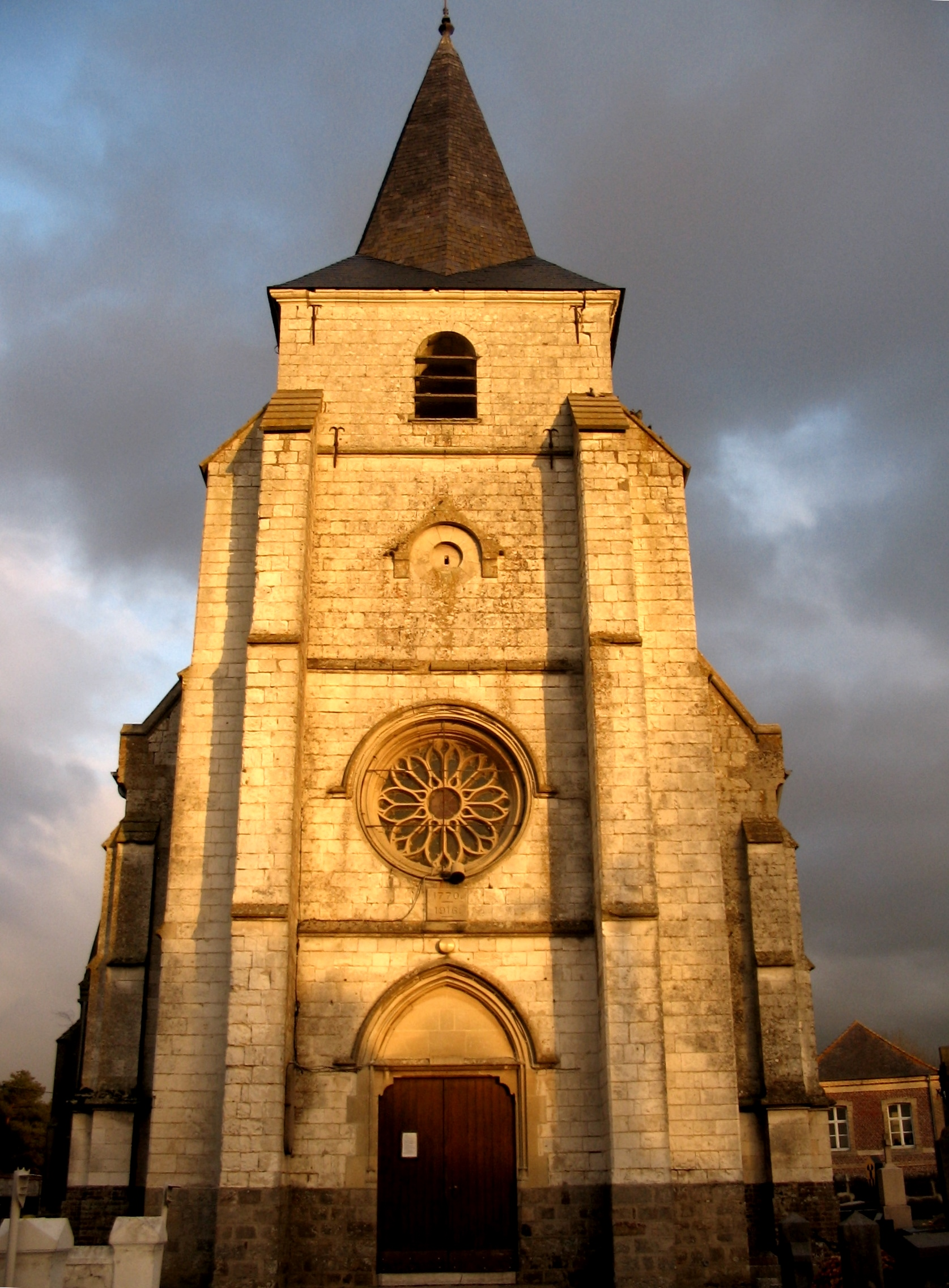 Eglise Saint Pierre Wailly Beaucamp